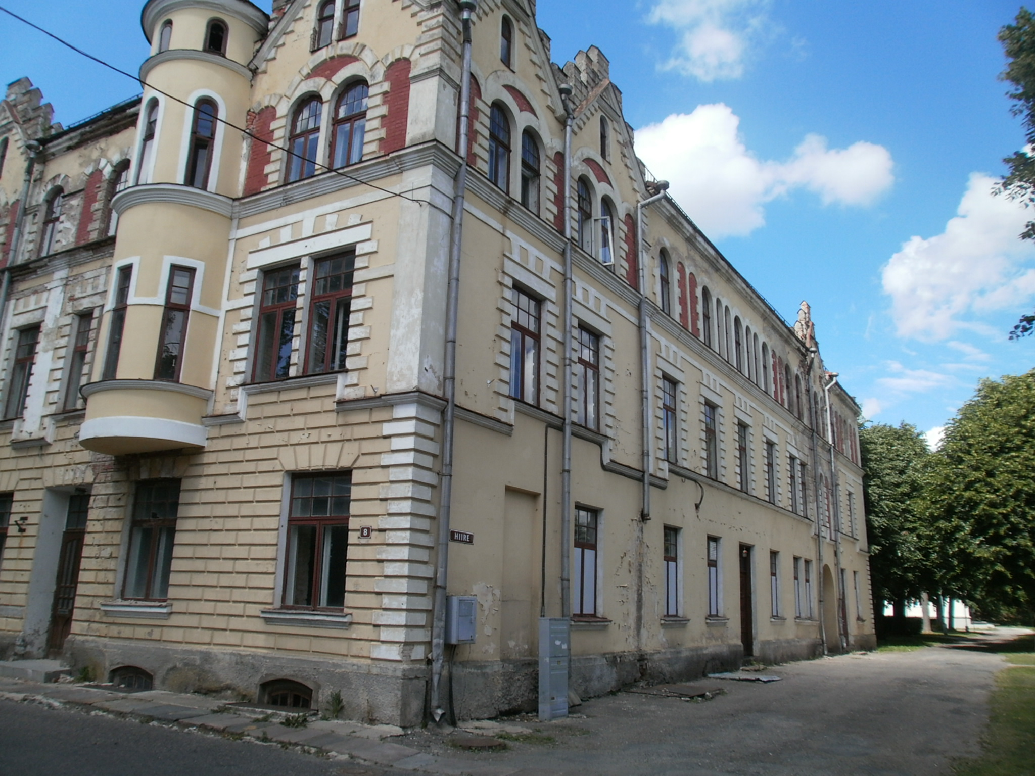 Vaade koolihoone Hiire tänava poolsele küljele.